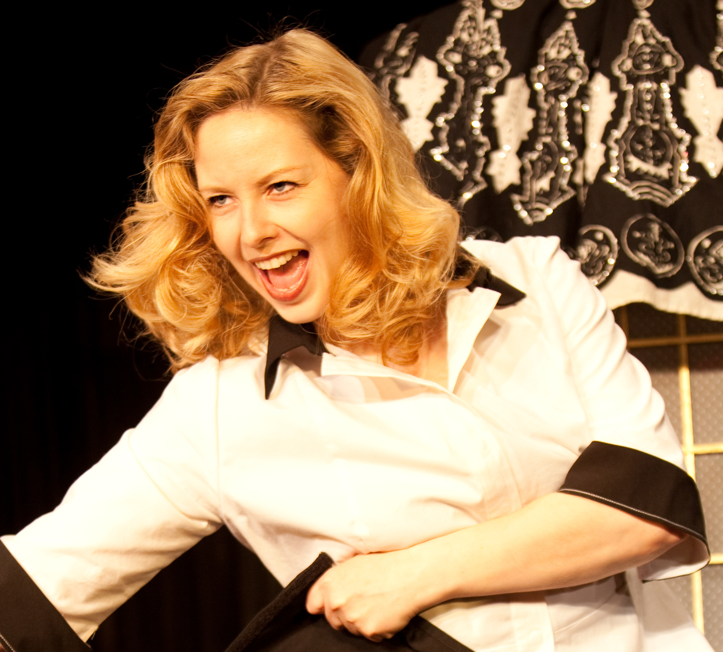 Tanja Rübcke